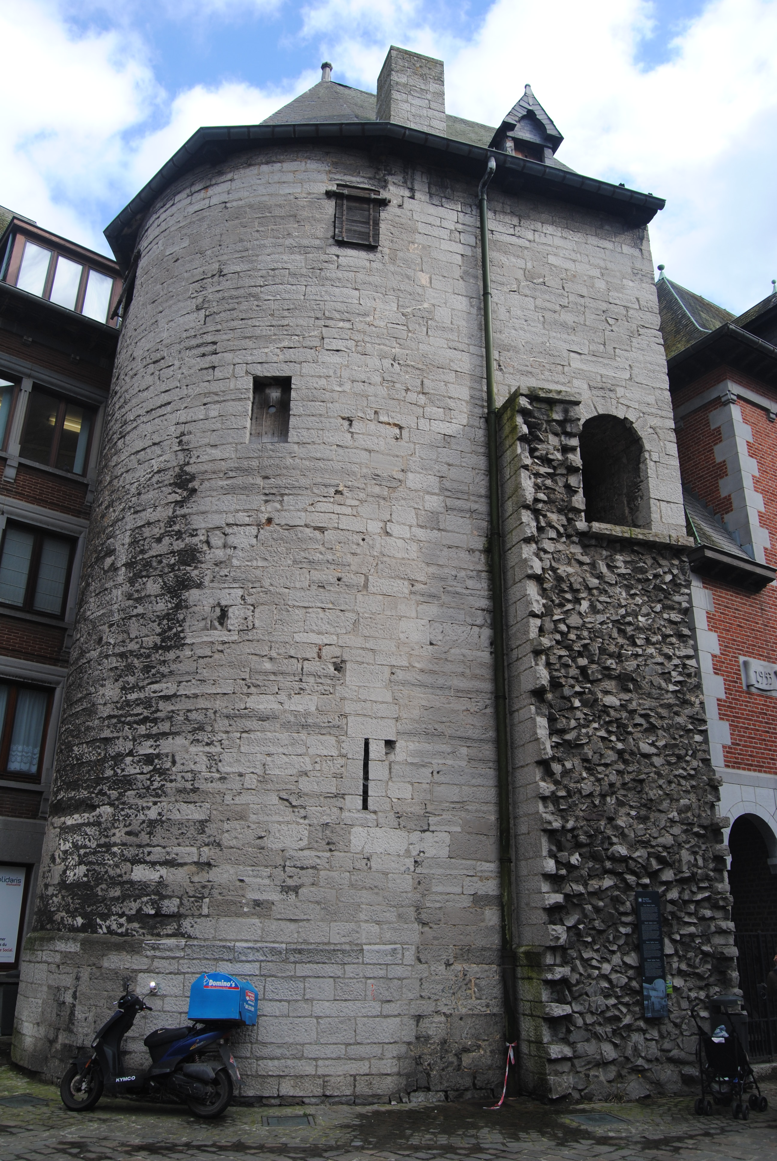 De marie Spilar toren (deel van de oude omwalling)